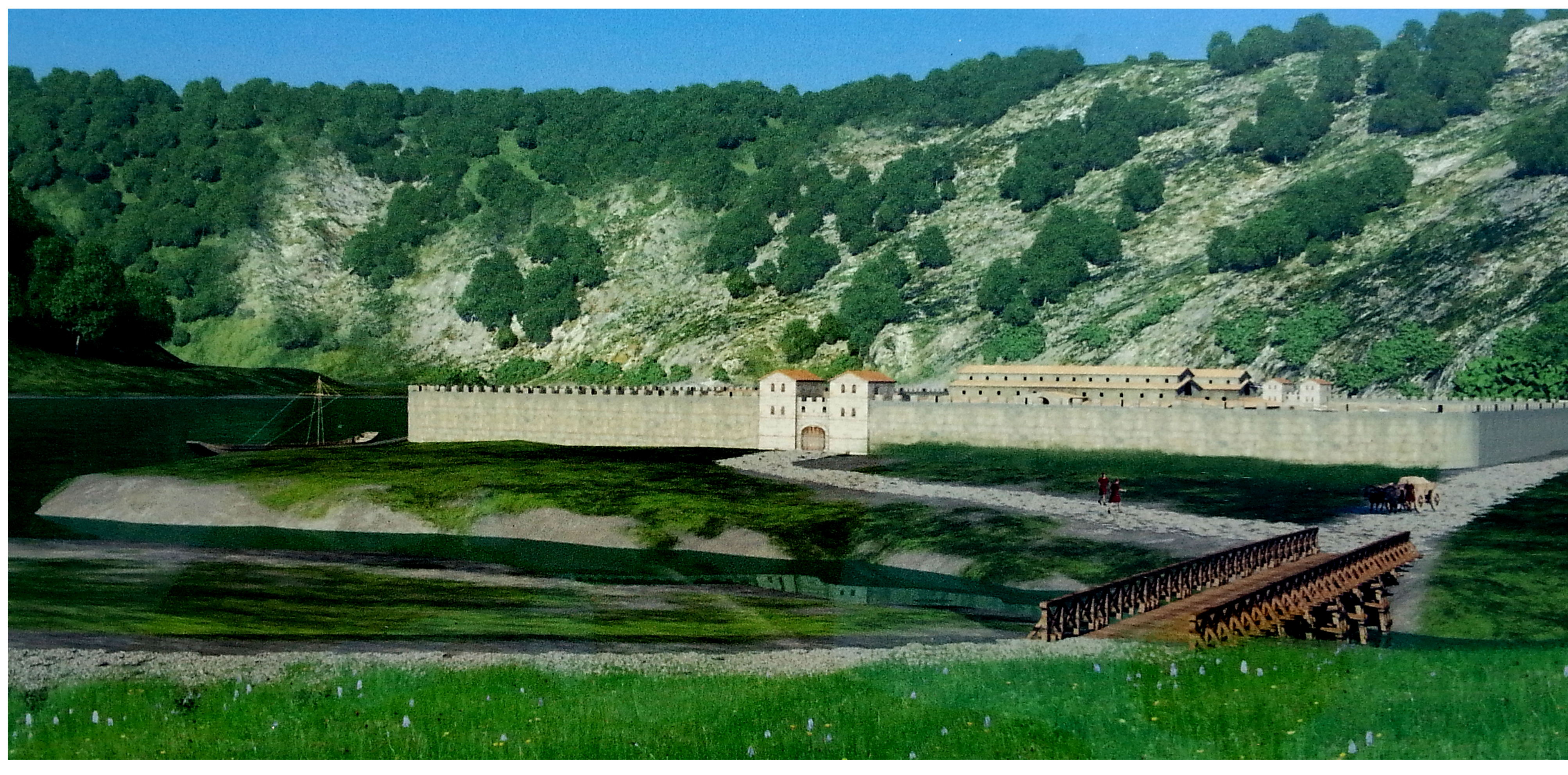 3d Rekonstruktion des Kleinkastell Schlögen/Österreich.